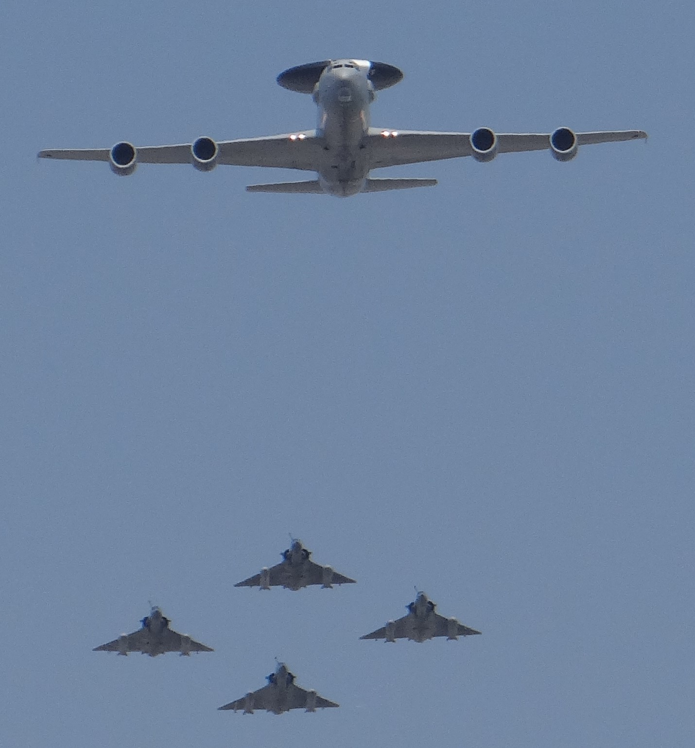 Défilé aérien du 14 juillet 2018 à Paris : 1 E-3F EDCA 00 036 Berry, 4 Mirage 2000-5 E1-2 Cigogne